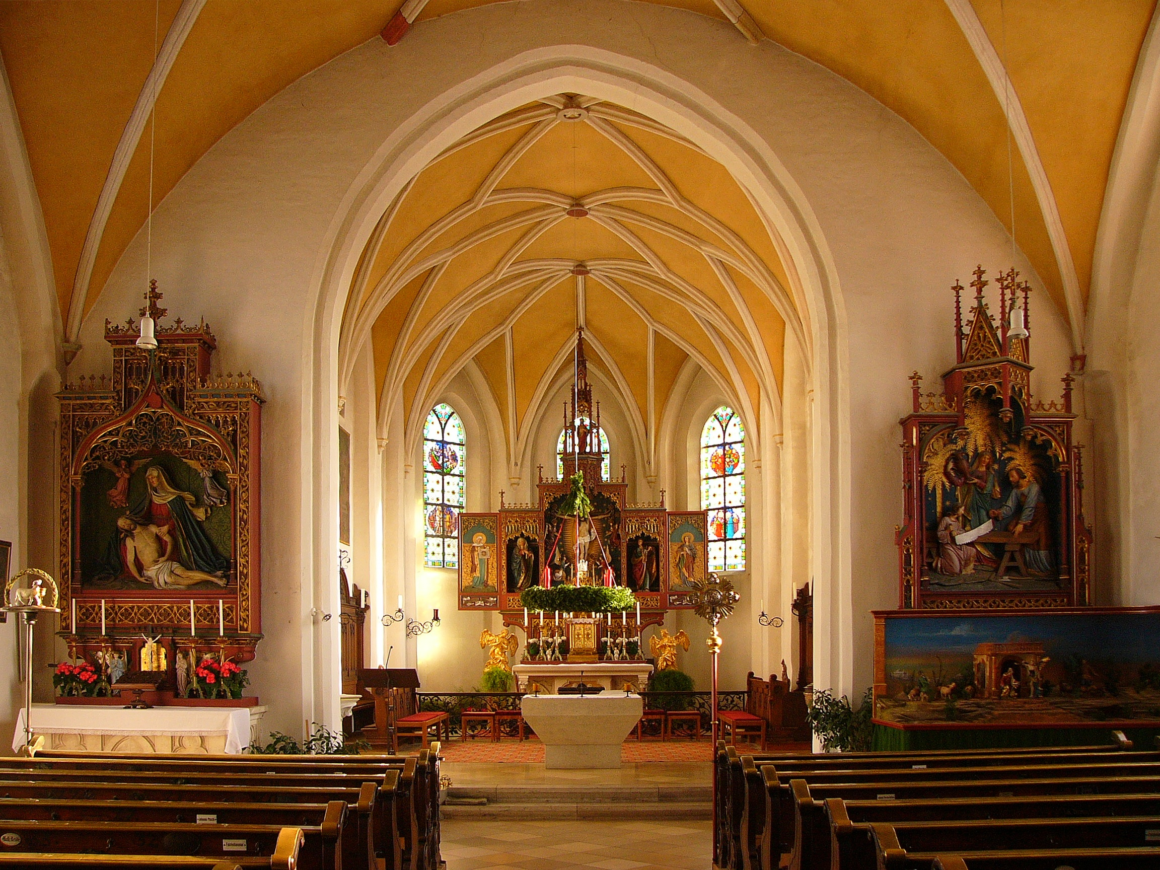 Kath. Pfarrkirche Hl. Blut; einschiffige, gewölbte Anlage, spätgotisch, Mitte 15. Jh., an der Westseite Vorhalle und zwei runde Flankentürme; mit Ausstattung. This is a photograph of an architectural monument.